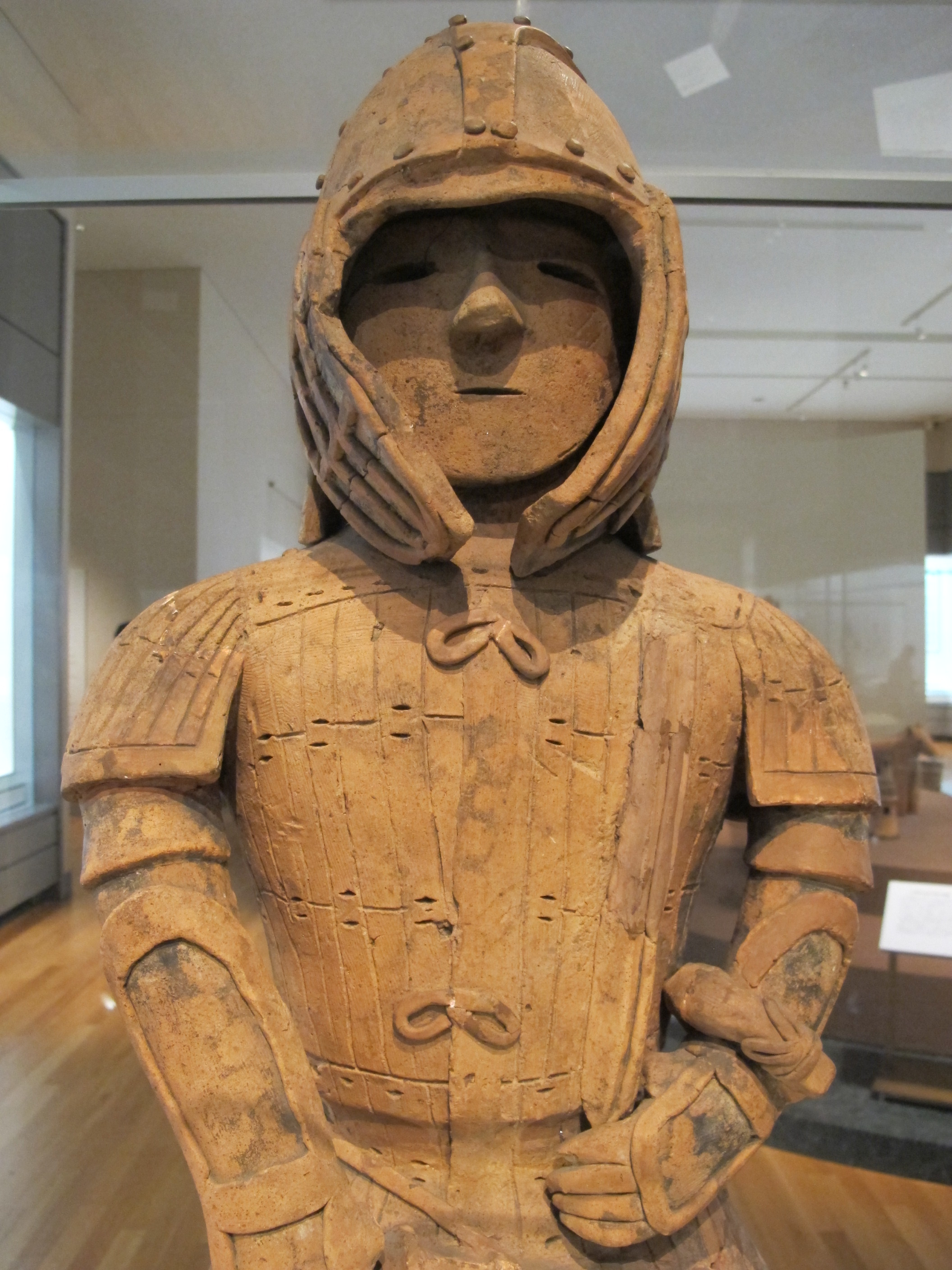 Periodo kofun, haniwa, guerriero con armatura keiko, VI sec